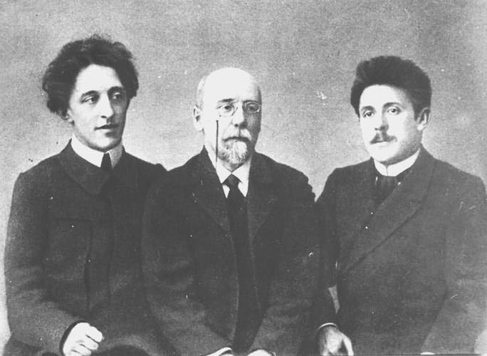 Группа писателей: А.Блок и Ф.Сологуб, Г.Чулков. Санкт-Петербург, 1908 год. Ателье Здобнова.